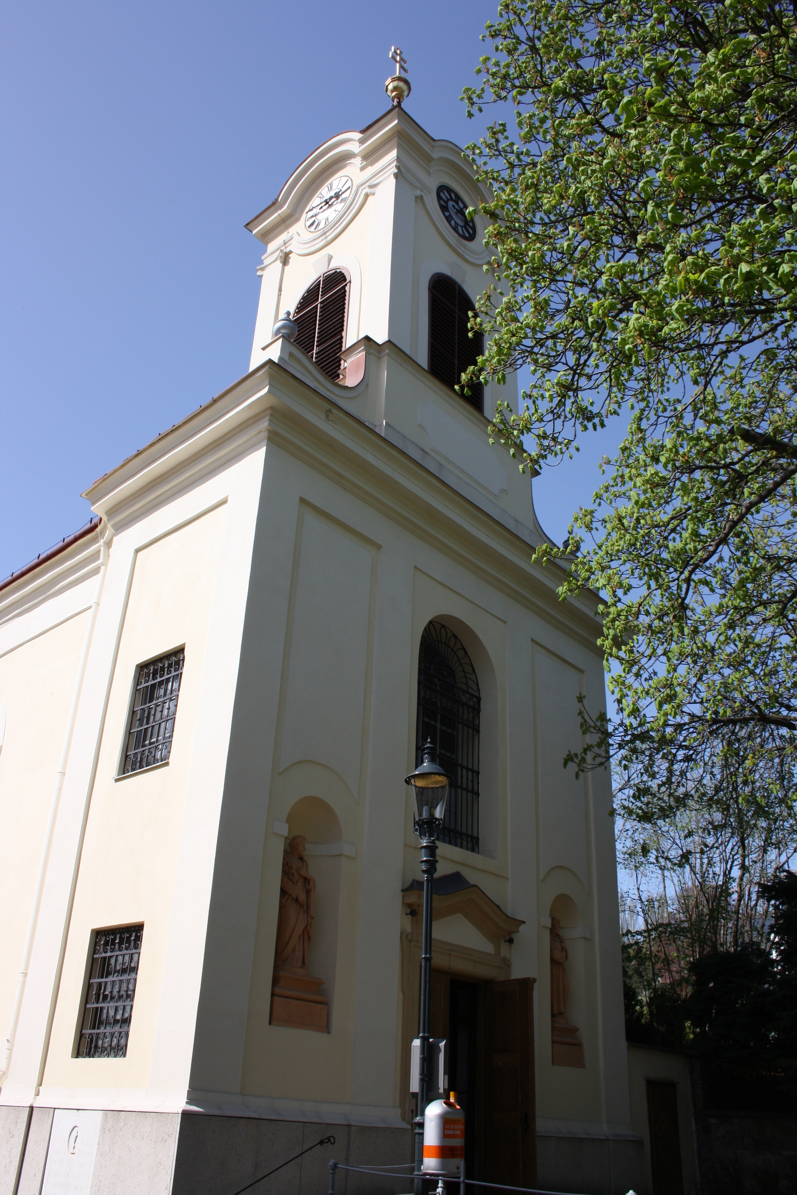 Ägydiuskirche Pötzleinsdorf, Front mit Kirchturm.